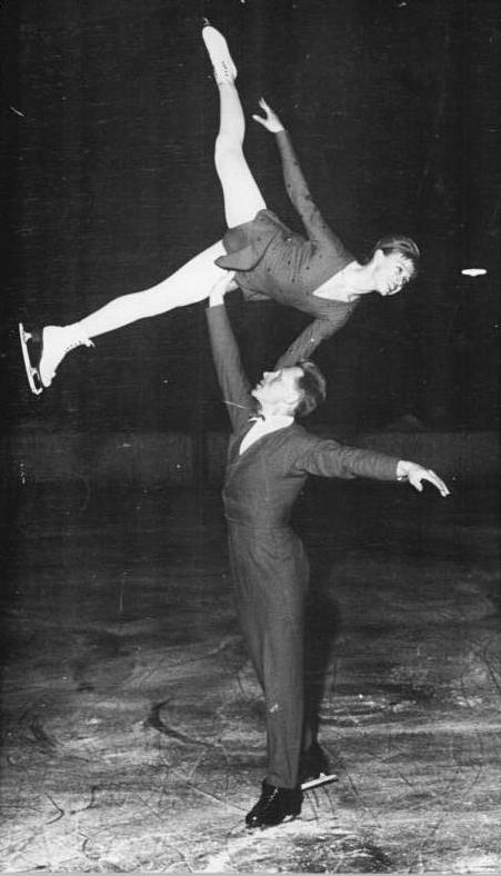 Ludmilla Belousoca, Oleg Protopopow Zentralbild Gahlbeck Wen-Gro 18.3.1963 Sowjetisches Eiskunstlaufpaar in der DDR Am 16.3.1963 fand im Kunsteisstadion in Karl-Marx-Stadt ein Eiskunstlaufschaulaufen mit den Zweiten bei den Welt- und Europameisterschaften 1963 im Paarlaufen, Ludmilla Belousoca-Oleg Protopopow statt. UBz: Das sowjetische Paar bei ihrer Kür.